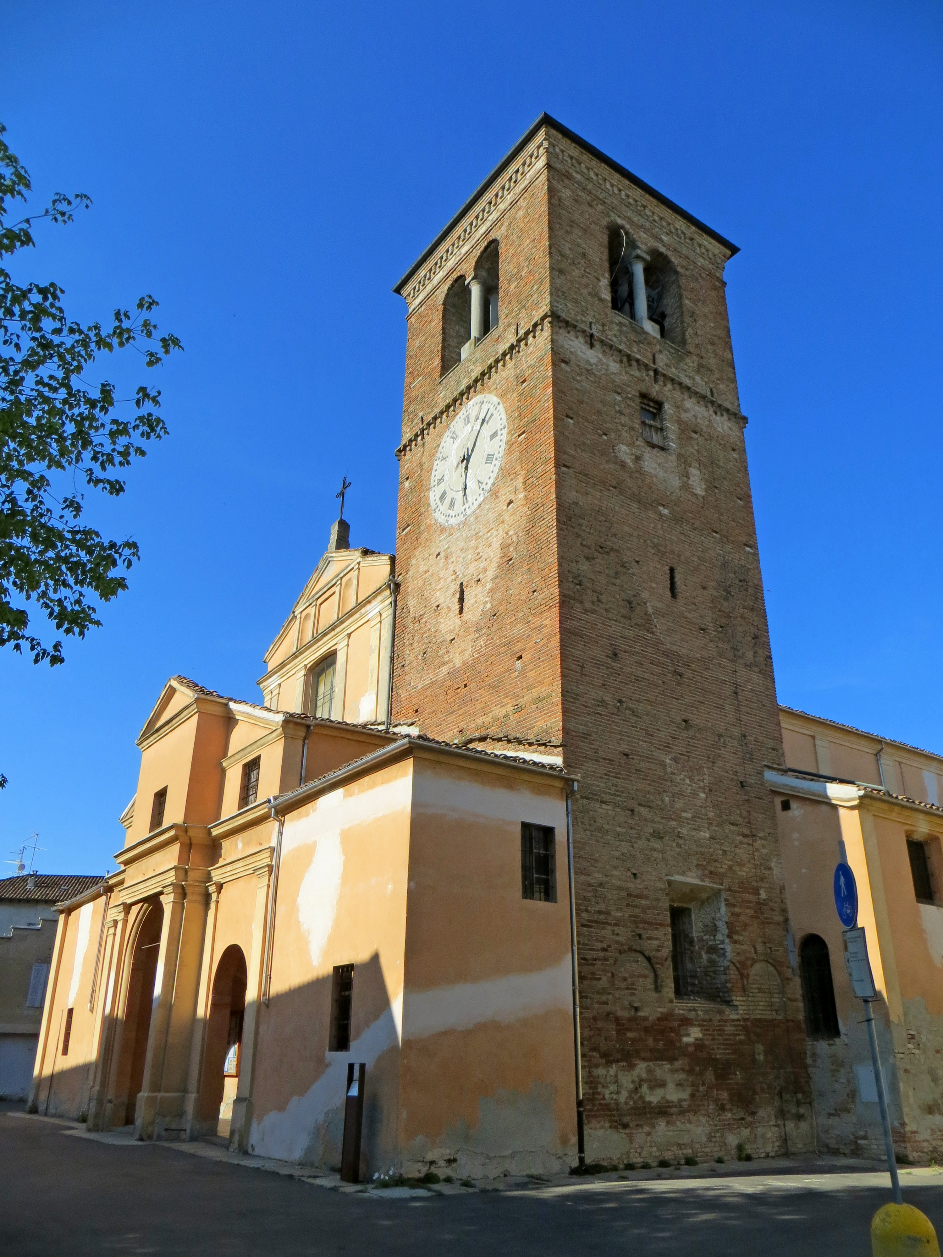 Chiesa di Santa Maria Assunta (Sissa) - facciata e campanile